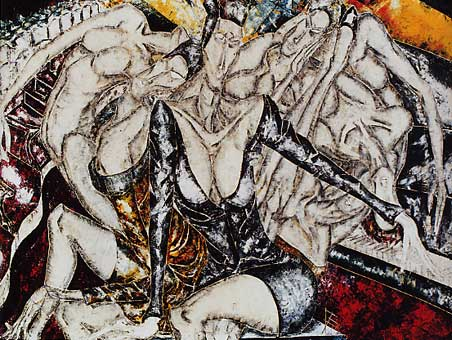 In Concert, 1994 Öl auf Leinwand 140 x 190 cm.